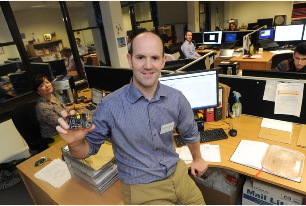 Raspberry Pi founder Dr Eben Upton